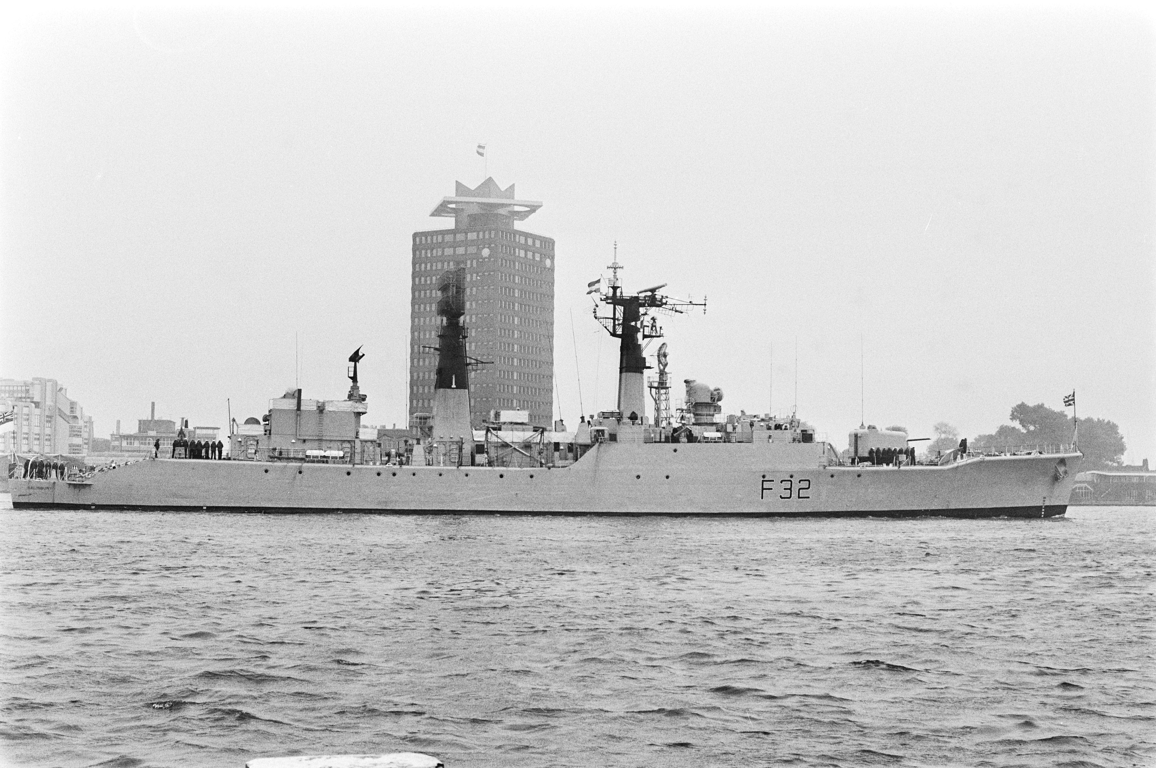 Collectie / Archief : Fotocollectie Anefo Reportage / Serie : [ onbekend ] Beschrijving : Navo-marineschepen bezoeken Amsterdam; een van de schepen in het IJ Datum : 25 september 1976 Locatie : Amsterdam, Noord-Holland Trefwoorden : SCHEPEN Fotograaf : Peters, Hans / Anefo Auteursrechthebbende : Nationaal Archief Materiaalsoort : Negatief (zwart/wit) Nummer archiefinventaris : bekijk toegang 2.24.01.05 Bestanddeelnummer : 928-7990